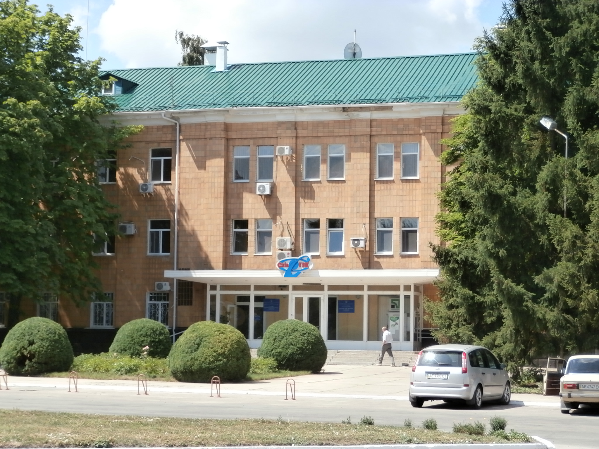 Eastern GOK Zentrale Schowti Wody